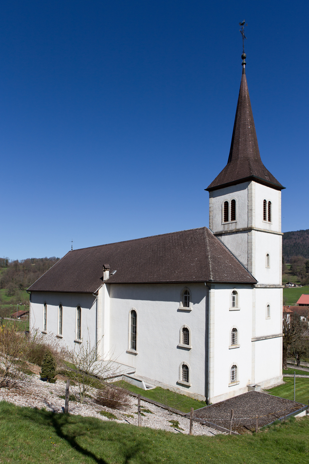 Kirche Sankt Imier in Courchapoix (JU)